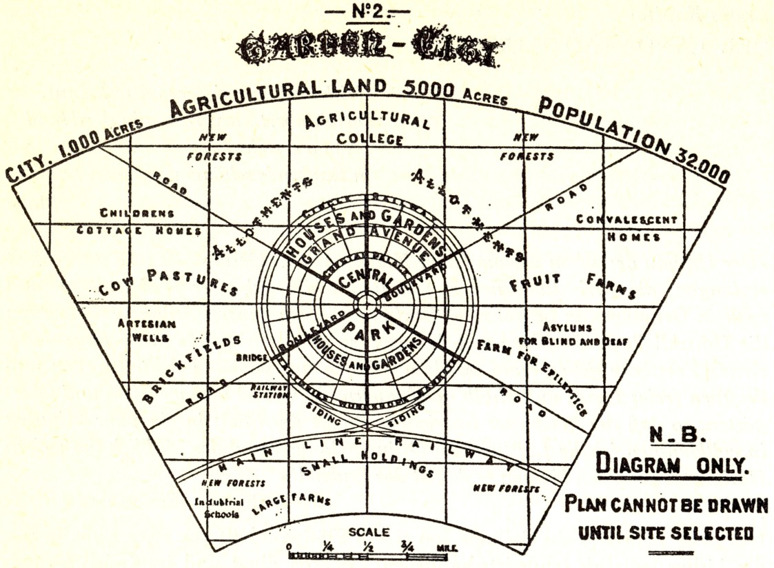 Diagramm der Gartenstadet bis zu 32.000 Einwohnern